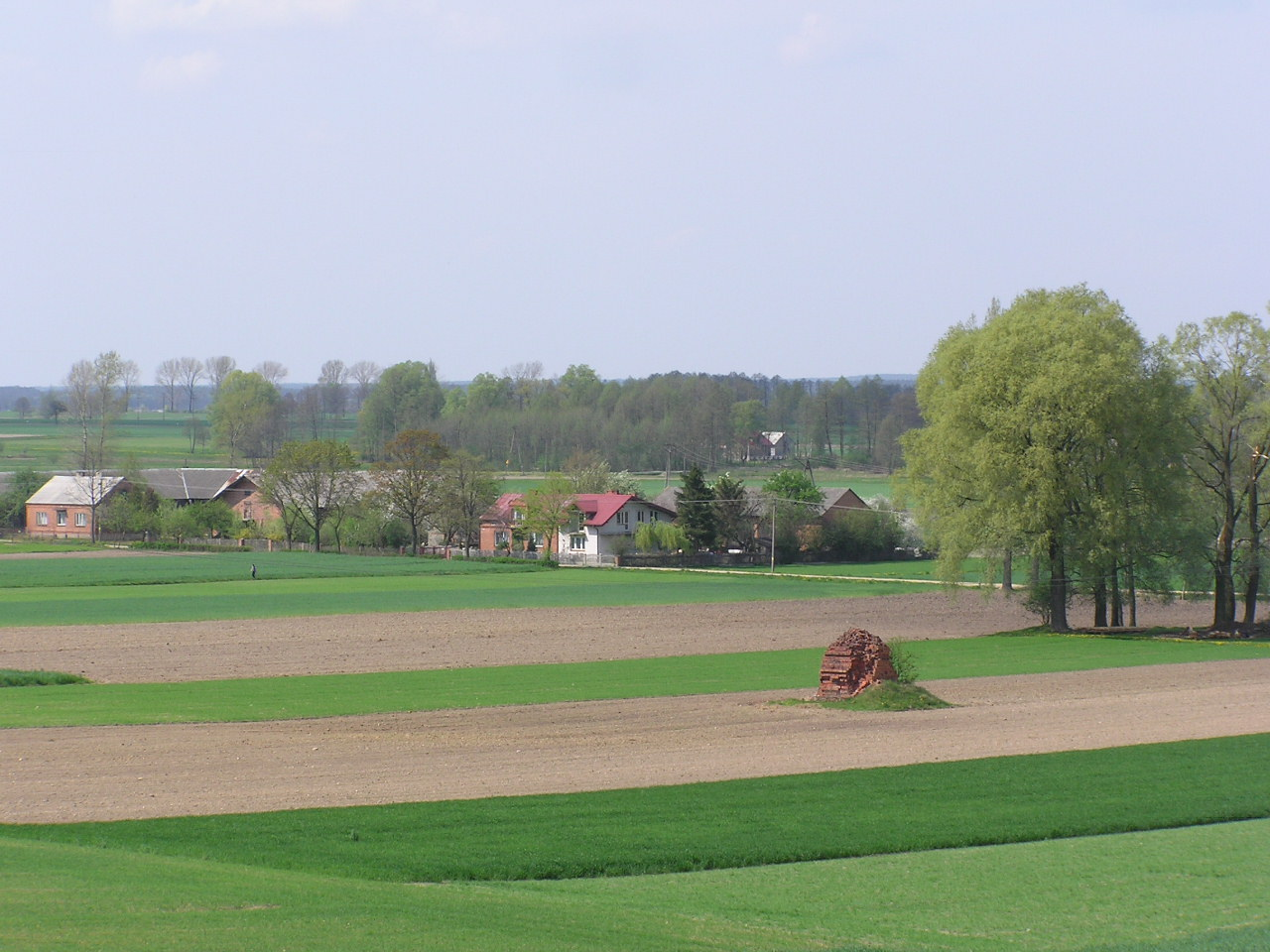 Owieczki-Poprzeczna Kraj : Polska Województwo : łódzkie Powiat : sieradzki Gmina : Klonowa Widok z Góry Niemojewskiej. Zabudowania w tle między drzewami to już Zatyle.